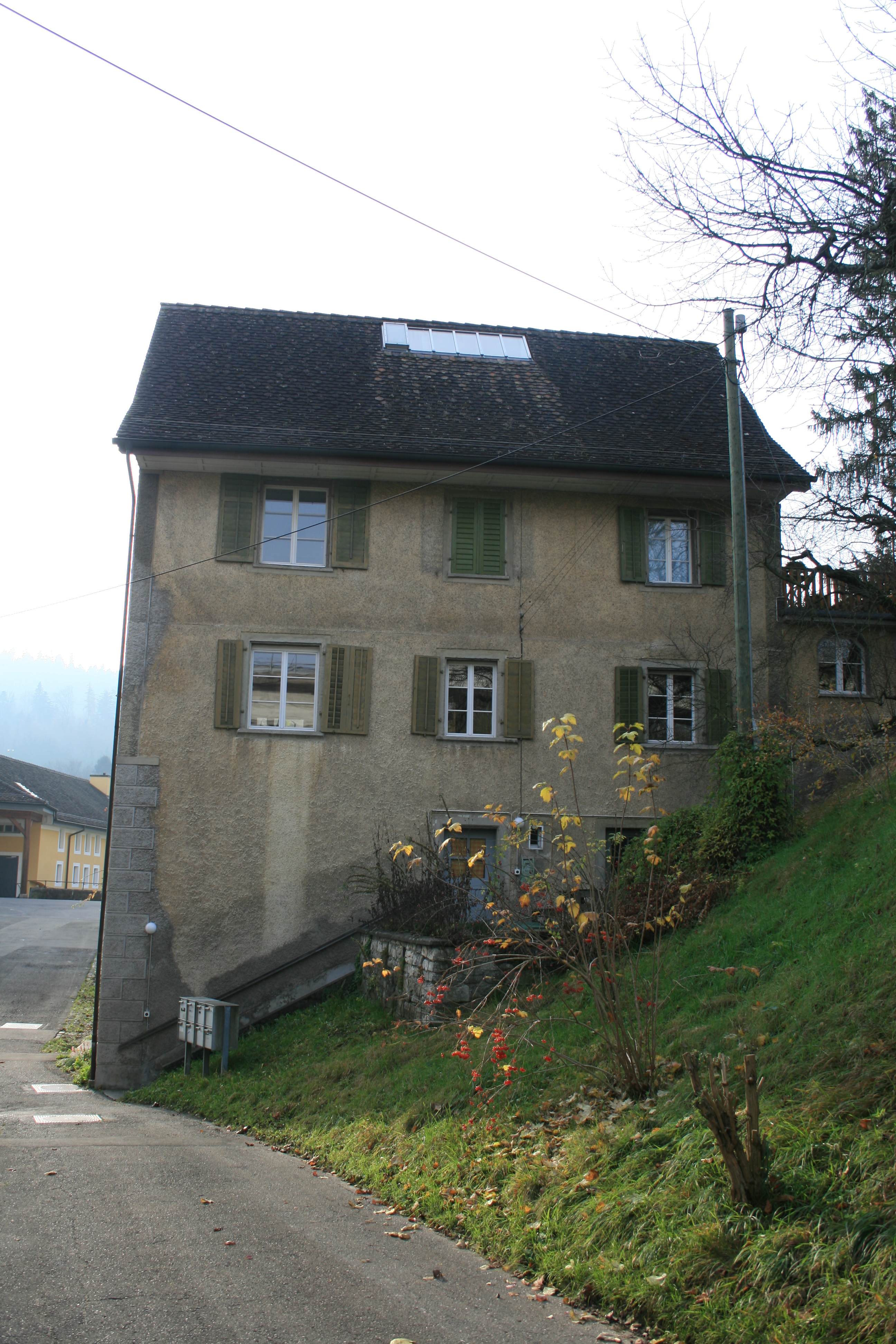 Doktorhaus Kanzlerrain, Wettingen